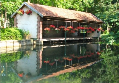 lavoir de maillot